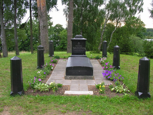 Grafo Konstantino Platerio kapas Plinkšėse, Mažeikių raj. Ant paminklo yra užrašas: “S.+P./KONSTANTY/HRABIA BRIÖEL PLIATER/27.Stycznia 1847-26.Serpnia 1899”. Apačioje pasirašė paminklo autorius: “A.Volz,Riga”. Foto: Algirdas, 2005 m. rugpjūčio 8 d.